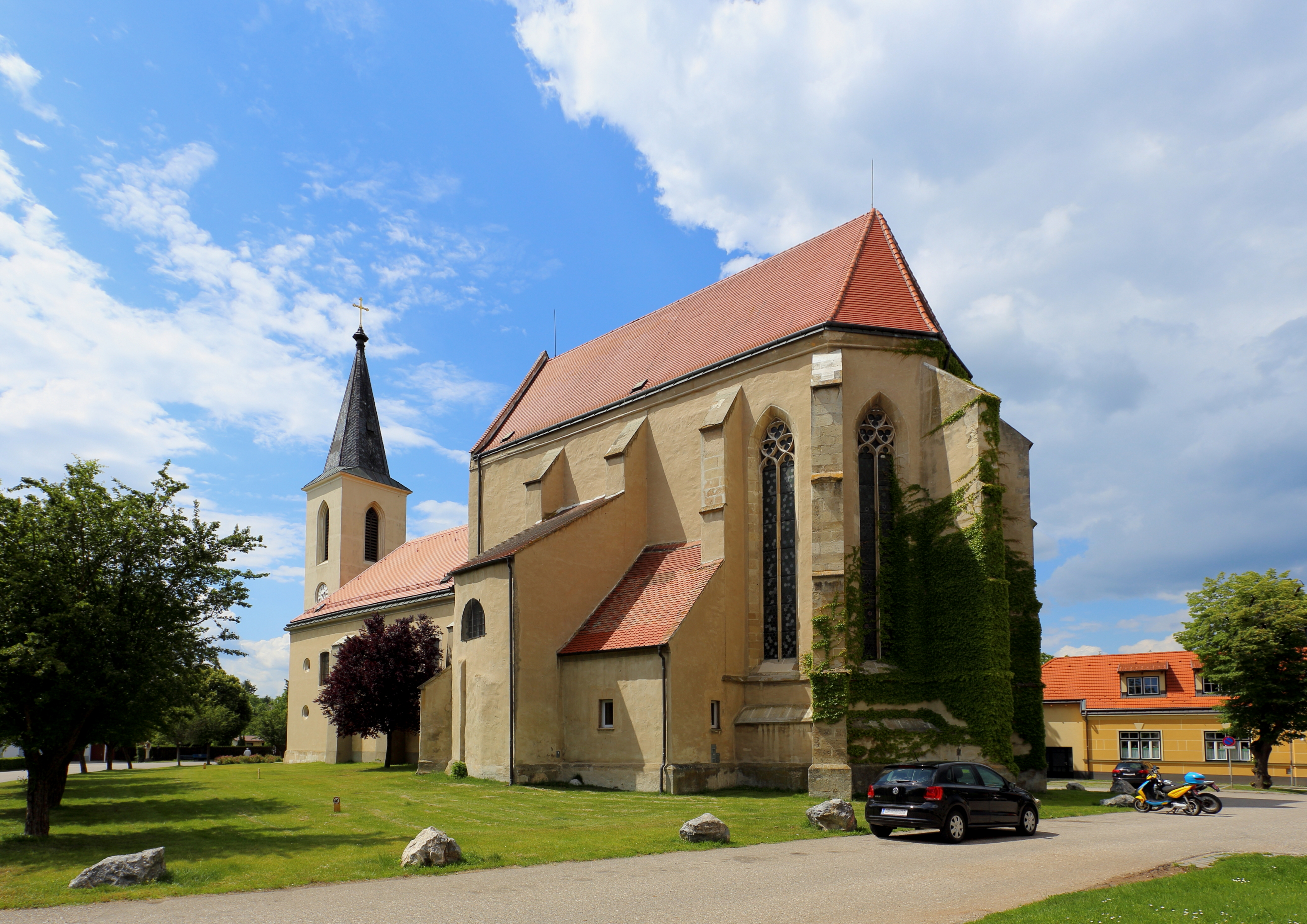 Südostansicht der Pfarrkirche hl. Margaretha der niederösterreichischen Stadt Marchegg. Der mächtige, mehrfach veränderter Sakralbau mit dominierendem frühgotischem Chor aus dem 3. Viertel des 13. Jahrhundert war ursprünglich von einem Friedhof umgeben und befindet sich in der Stadtmitte. Die Kirche war 1268 als große dreischiffige Stadtpfarrkirche konzipiert. Nach schweren Zerstörungen durch den ersten österreichischen Türkenkrieg 1529 und 1634 (Schwedenkrieg) wurde nur der Chorbau als Kirche verwendet. Unter Karl Fürst Pálffy errichtete man 1789/90 das wesentlich kleinere Langhaus. Der zweigeschossige Westturm mit steilem Spitzhelm wurde 1855 errichtet.